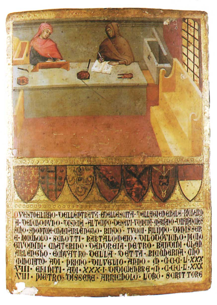 Biccherna senese, raffigurante l'ufficio del Camerlengo (ufficio di esattoria del comune di Siena). Tempera su tavola, 35 x 25 cm, anno 1380. Siena, archivio di Stato, Museo delle tavolette di Biccherna.